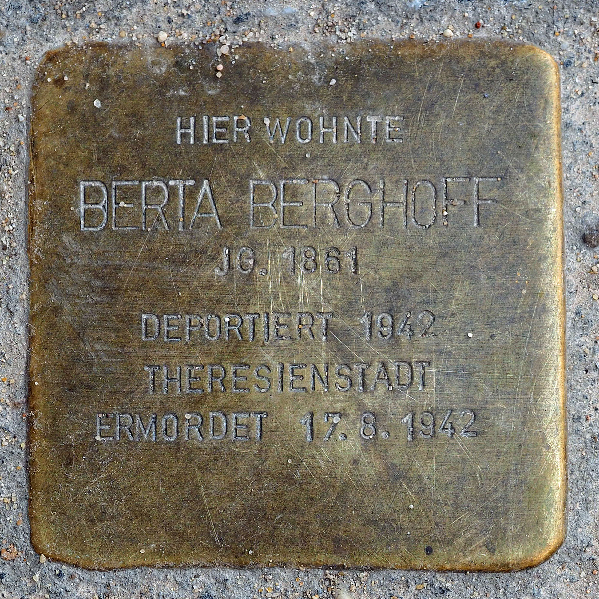 Stolpersteine in Kempen: Berta Berghoff, Engerstraße 38